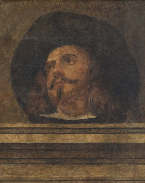 Nicolás de Villacis, Caballero del chambergo, pintura al temple pasada a lienzo, Murcia, Museo de Bellas Artes.